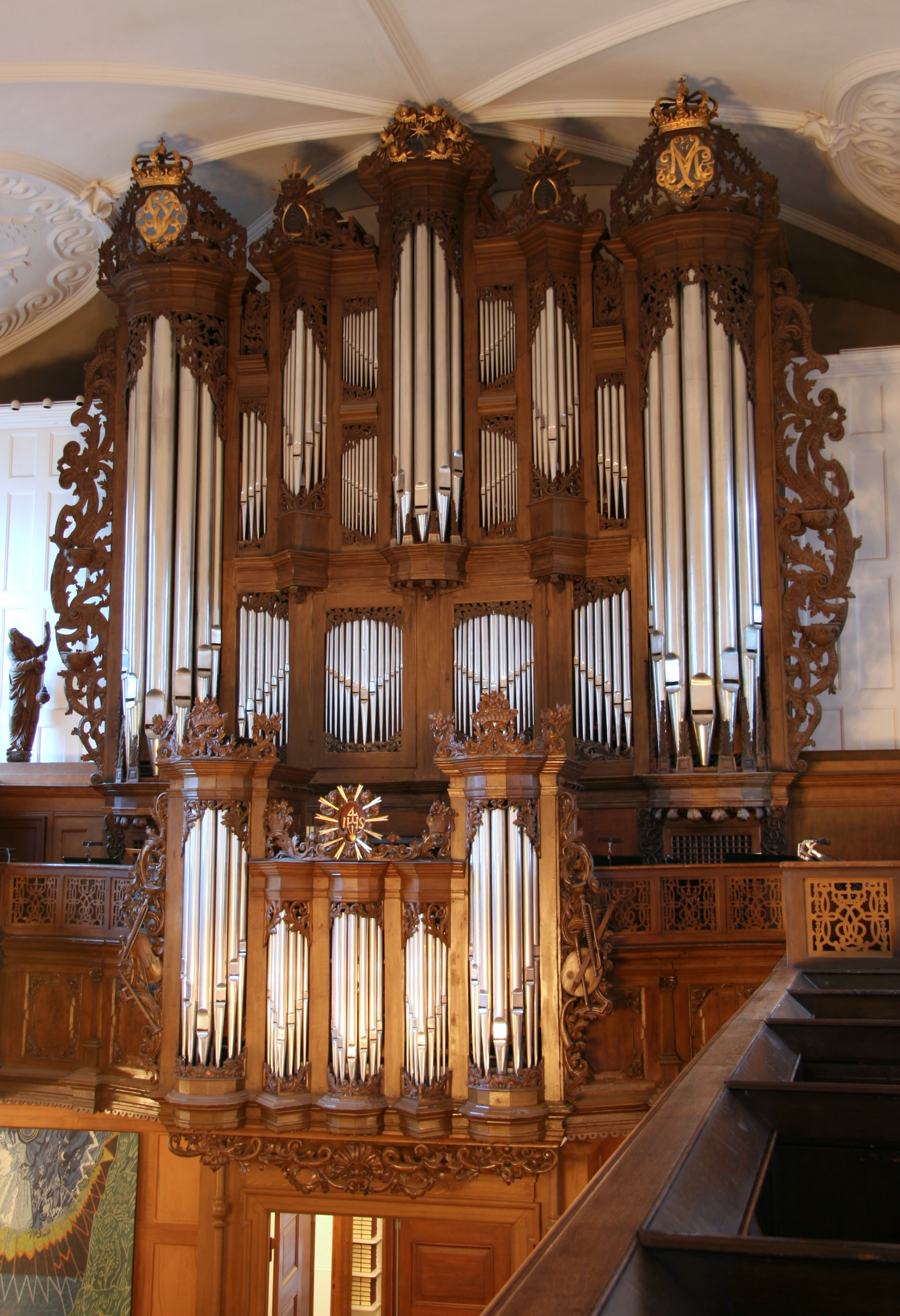 Holmens Kirke, Copenhagen, Denmark . Orgelfacade.